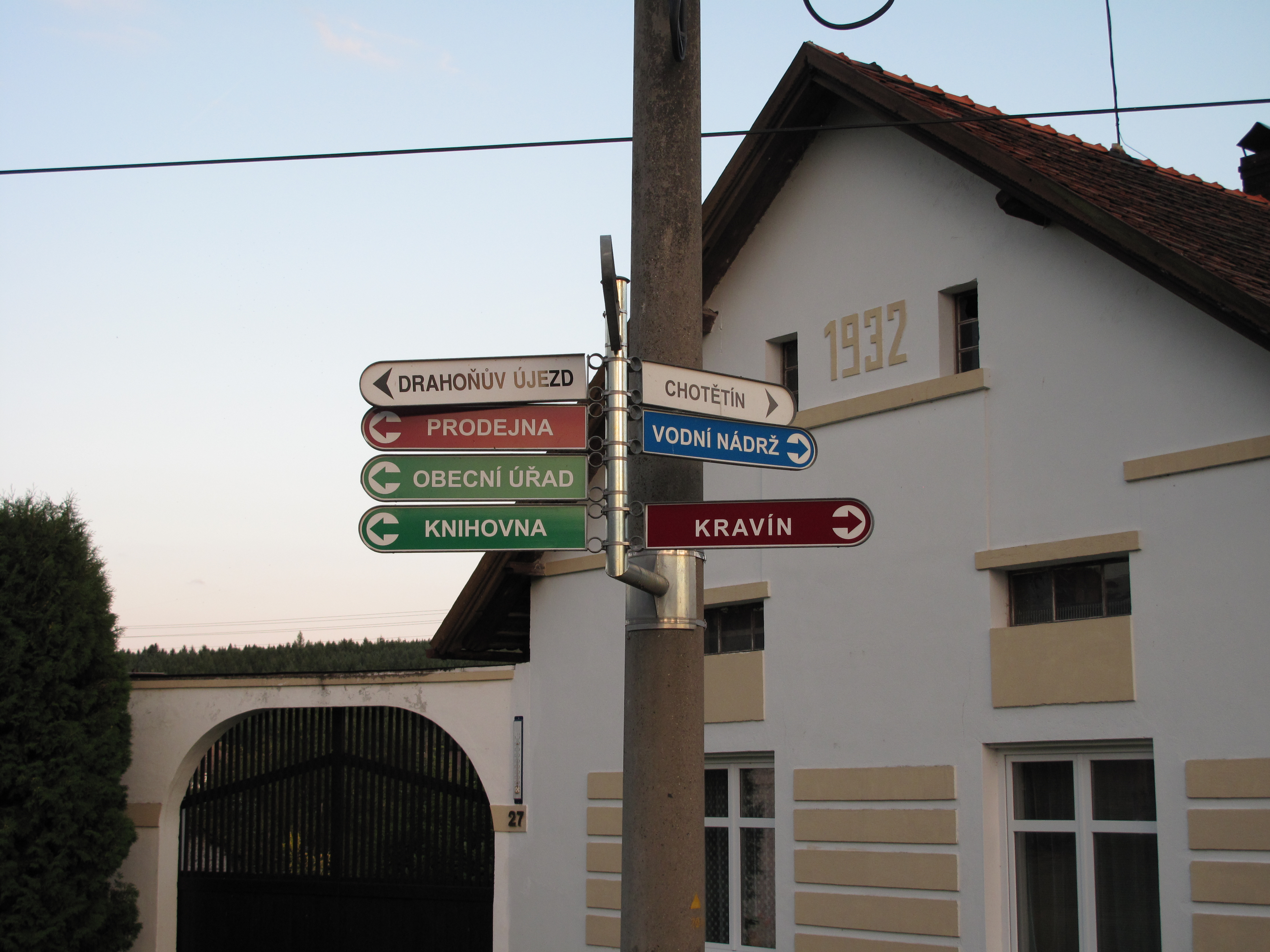 Rozcstník v Sebečicích. Okres Rokycany, Česká republika.